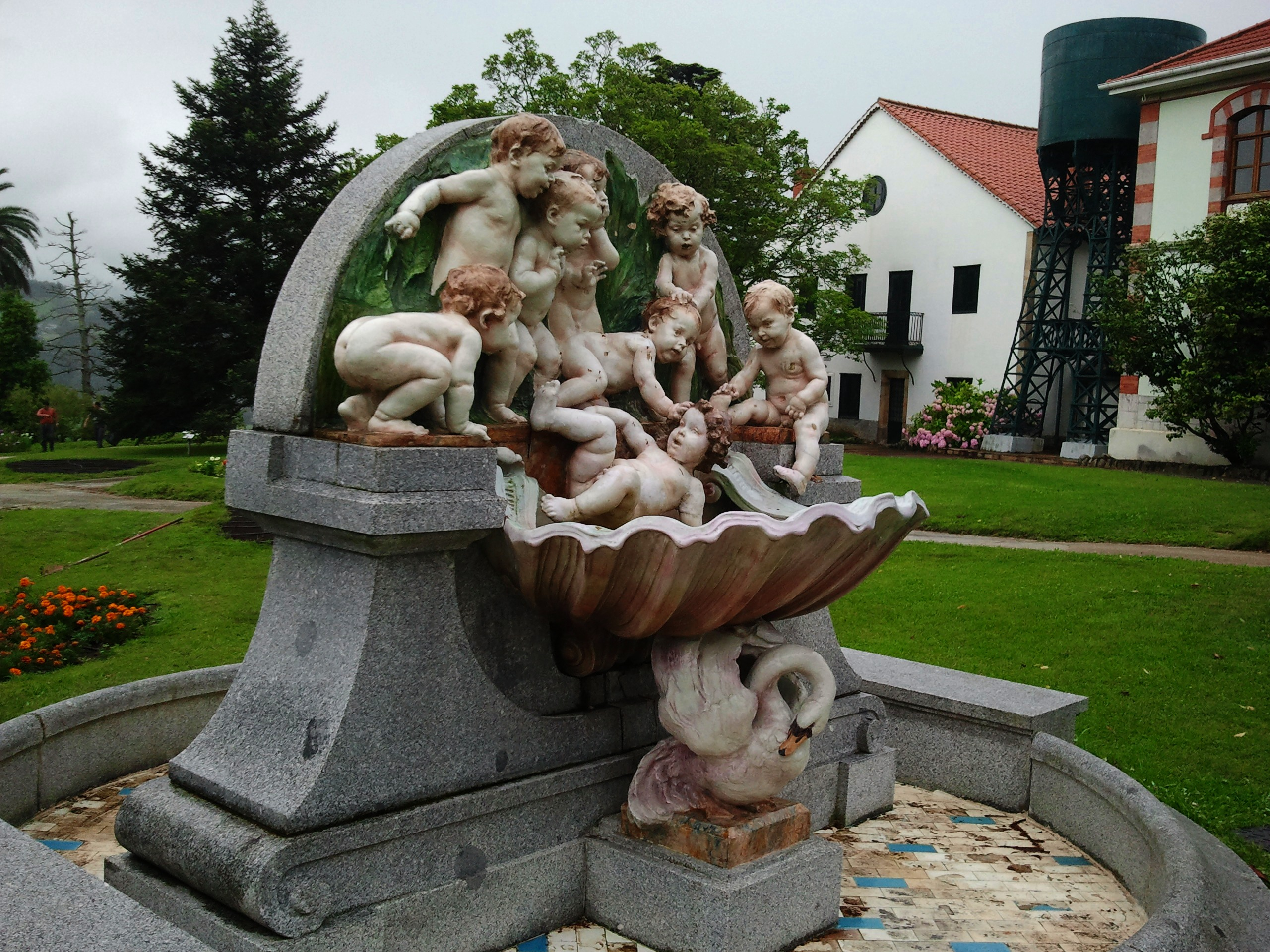 La Fuente de los Niños (1928), de Mariano Benlliure. Copia de la original realizada por el artista en cerámica policromada situada en la Finca del Marqués de Valdecilla, en Medio Cudeyo (Cantabria, España).